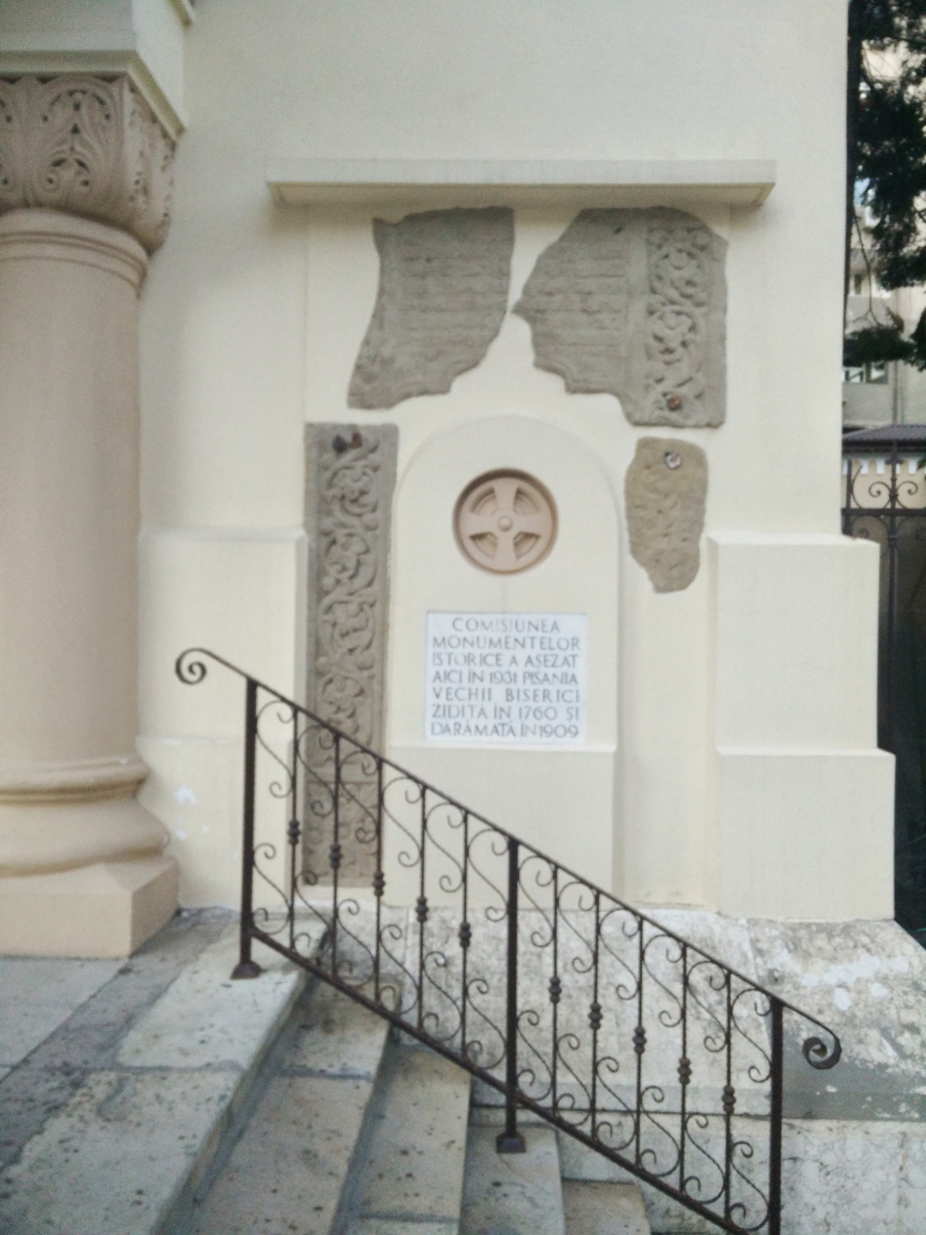 Pisania Bisericii Bradu - Boteanu